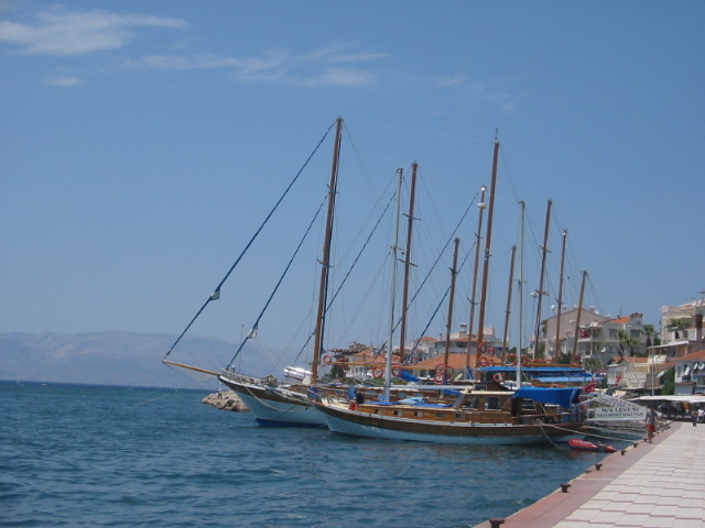 Kendi cektigim fotograf. Brecht 22:18, 23 Ocak 2007 (UTC) Kategori:Yerleşim yeri resimleri